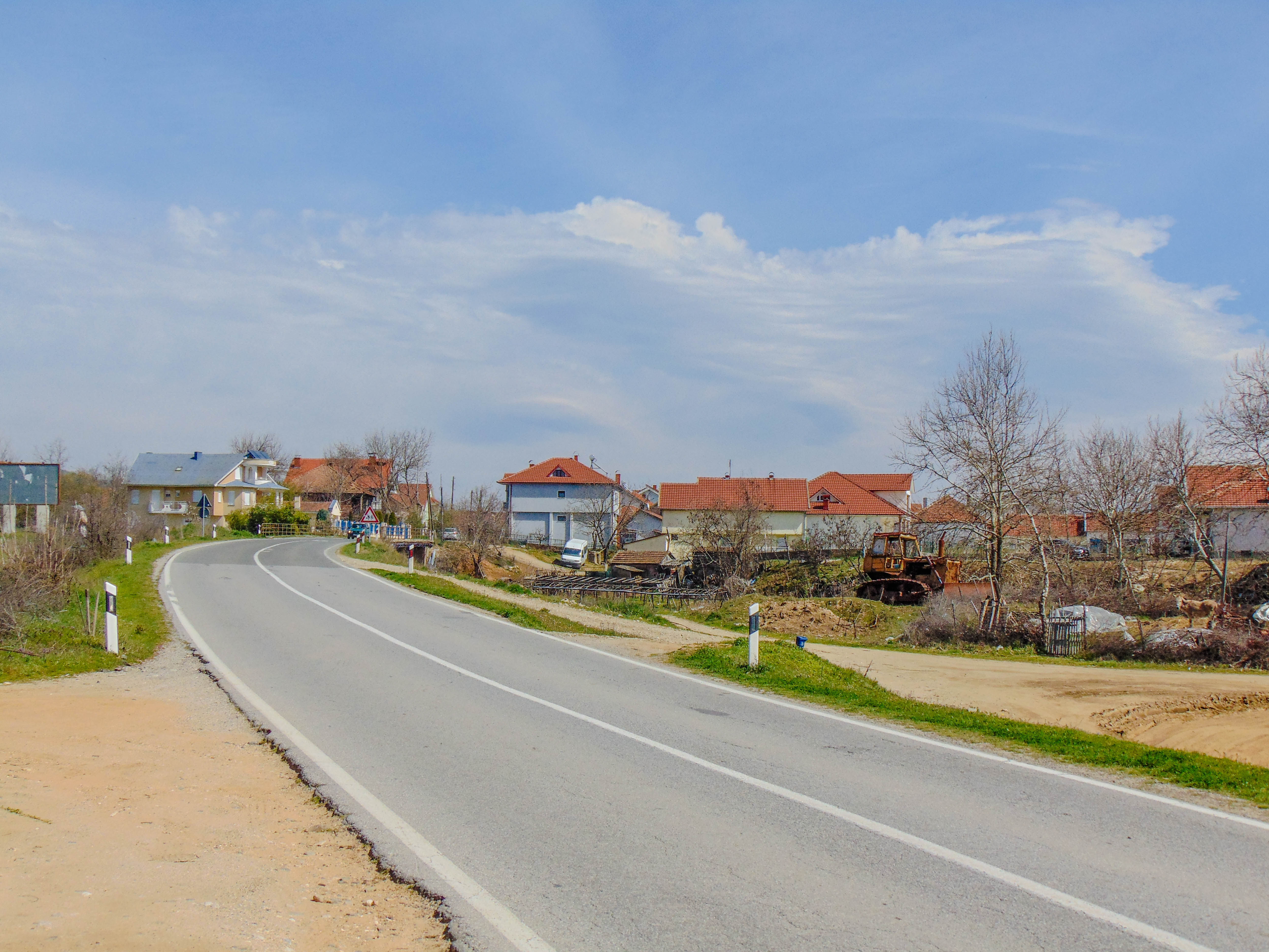 Ново Коњарево